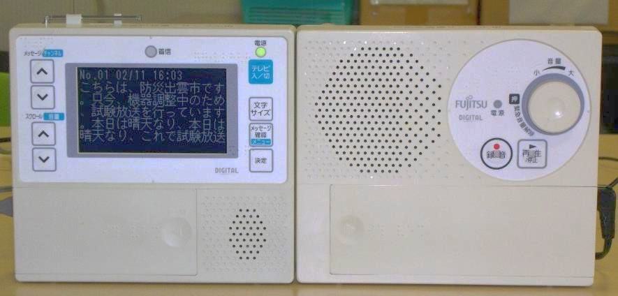 島根県出雲市の、市町村防災行政無線用戸別受信装置 CR-668型と、難聴者用の着脱式文字表示装置（富士通ゼネラル製）。